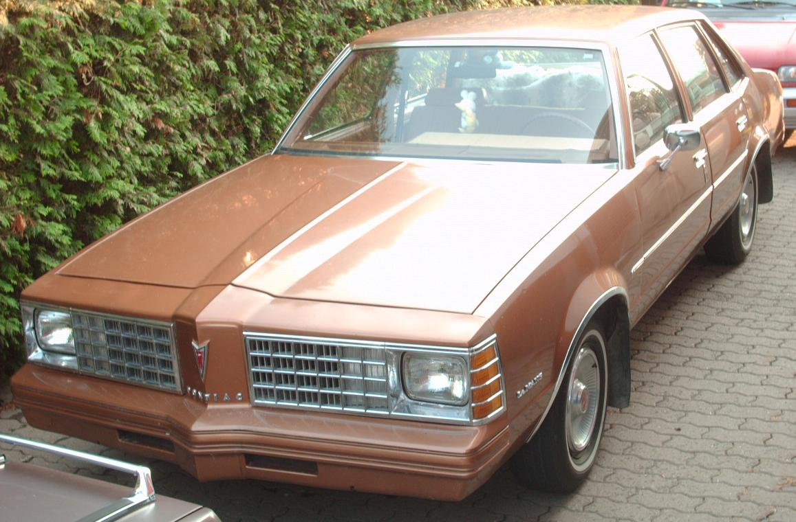 1979 Pontiac LeMans photographed in Pointe des Cascades, Quebec, Canada.